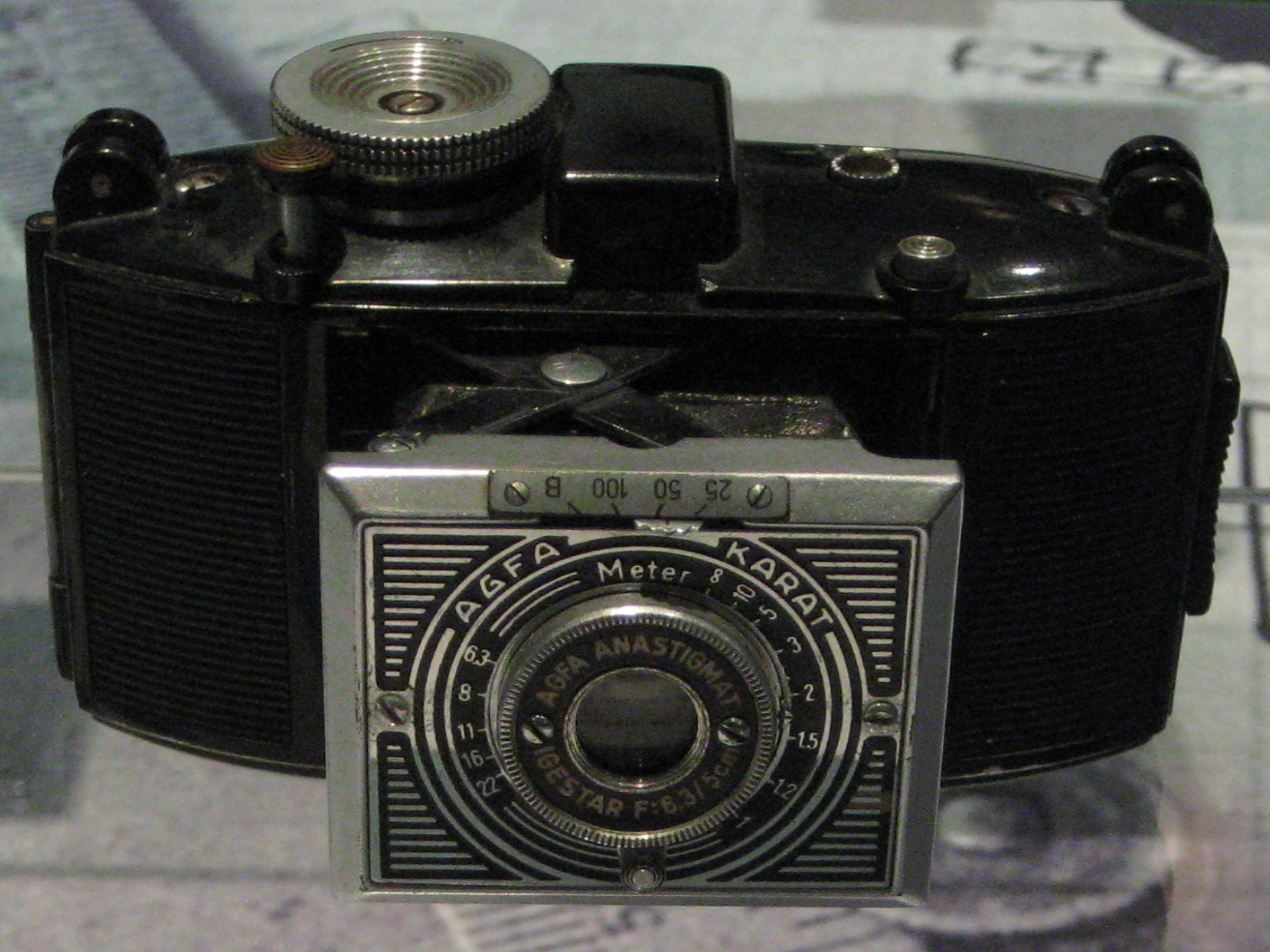 Agfa Karat 6.3, Springkamera, Art déco-Gehäusefront, 1937